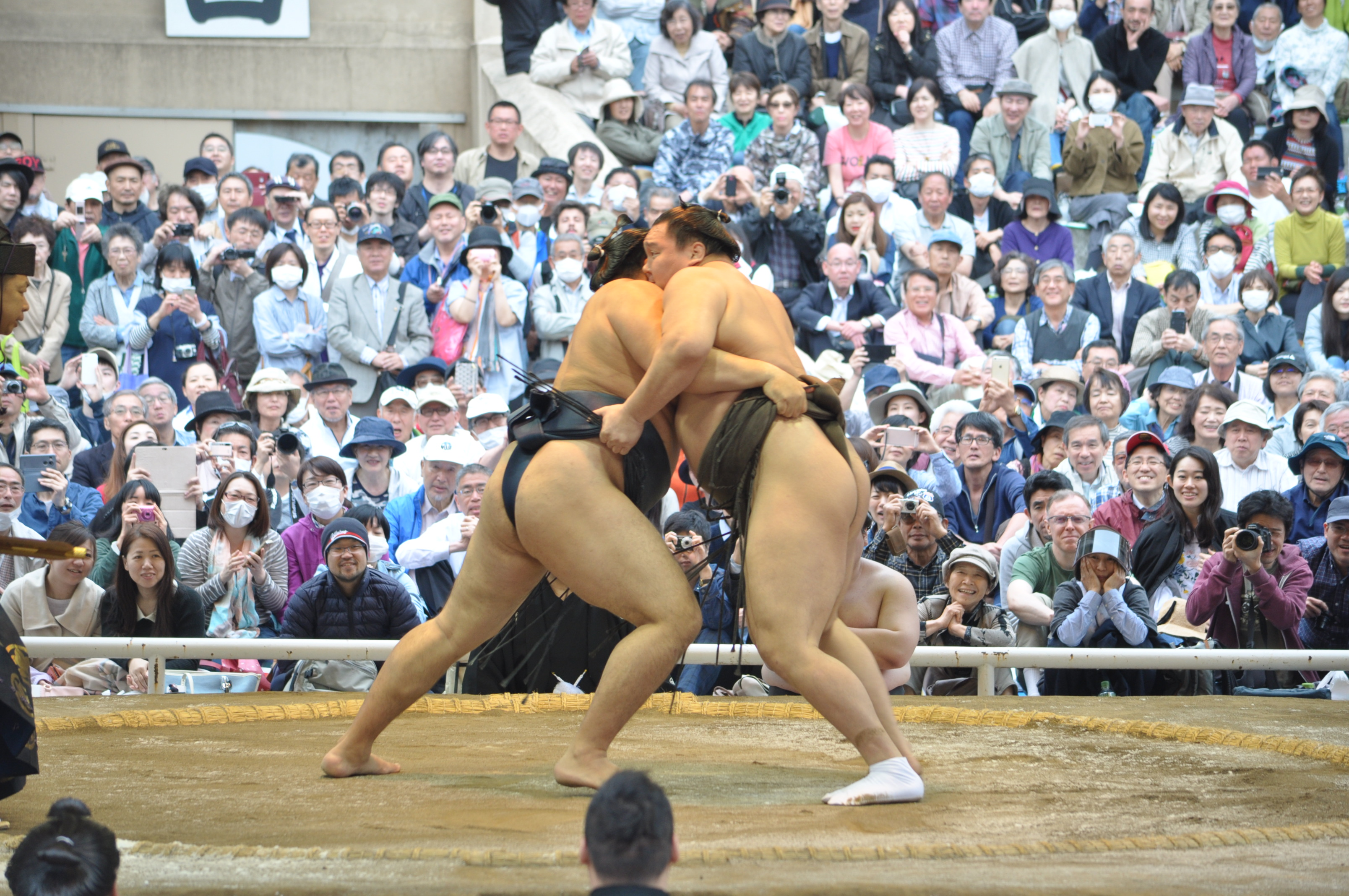 白鵬 翔 関